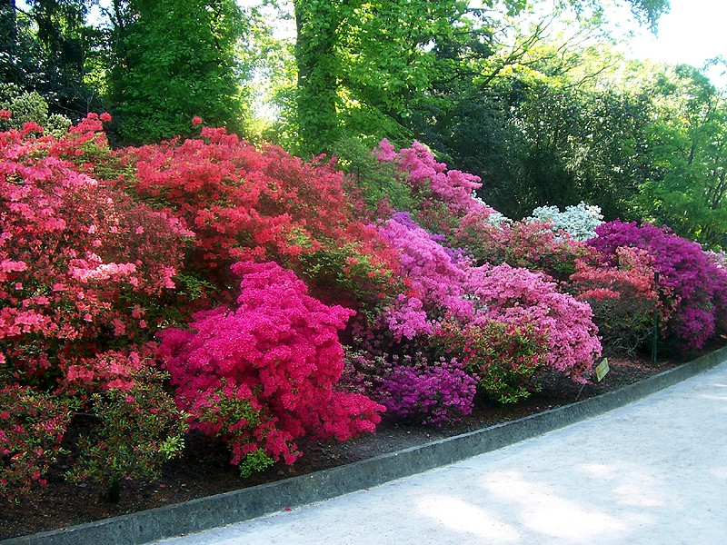 Verbania - Giardini di Villa Taranto